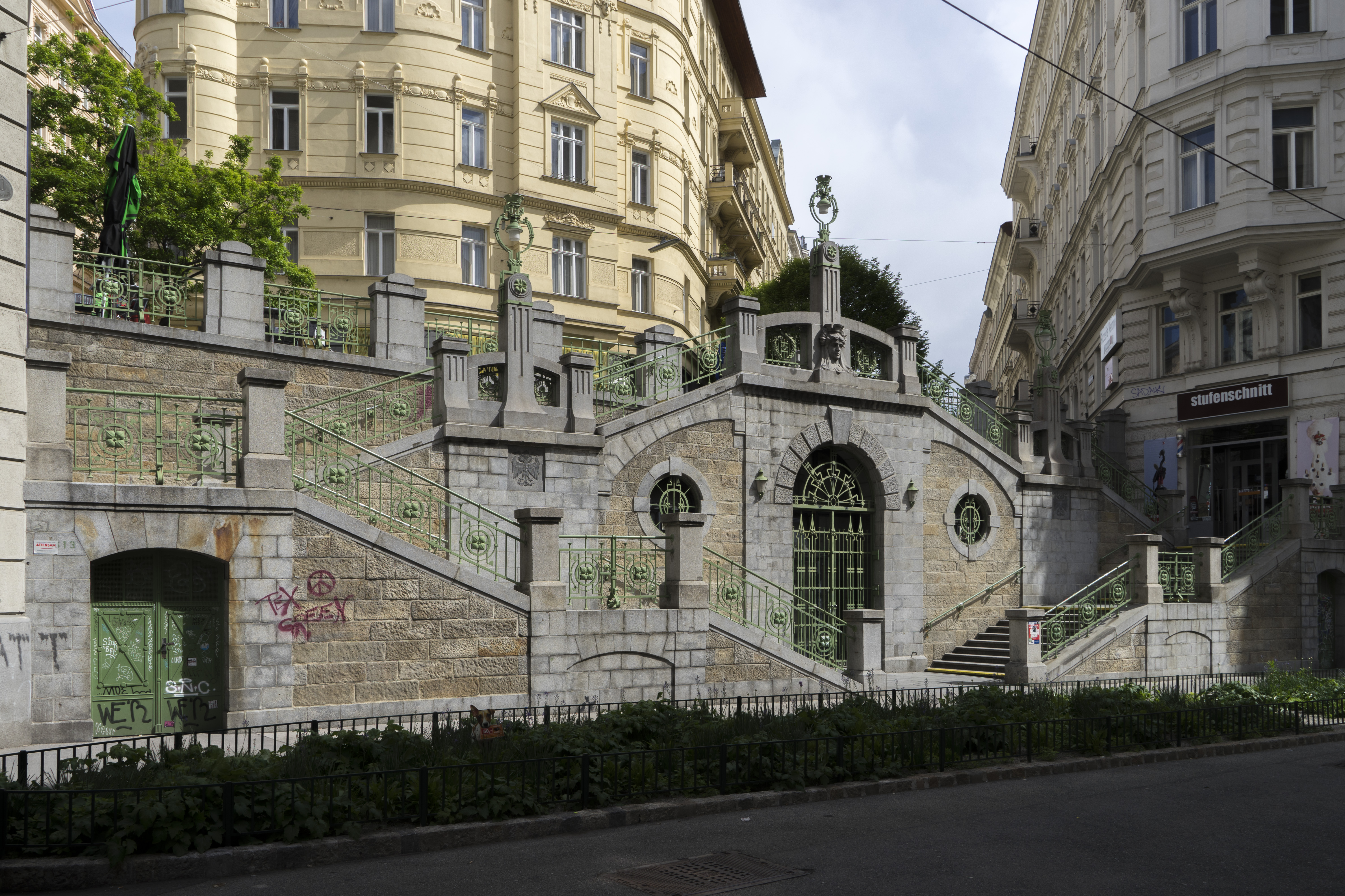 Fillgraderstiege, Wien